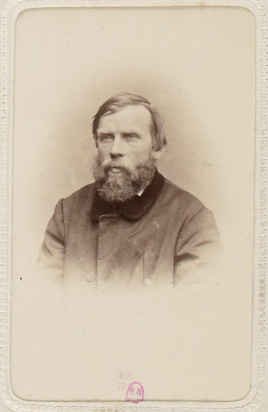 Portrait photographique de Jean-Baptiste Girard (1821-1900), vers 1880 (?) Photographe inconnu. Origine : Gallica Recueil. Personnalités françaises et étrangères sous le Second Empire.